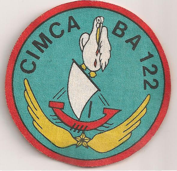 Insigne du Centre d'Instruction Militaire de la Cité de l'Air CIMCA 41 122 installé sur la Base Aérienne 122 Chartres-Champhol